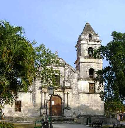 Fachada de la Iglesia Parroquial de Nuestra Sra. del Rosario, vista desde el parque